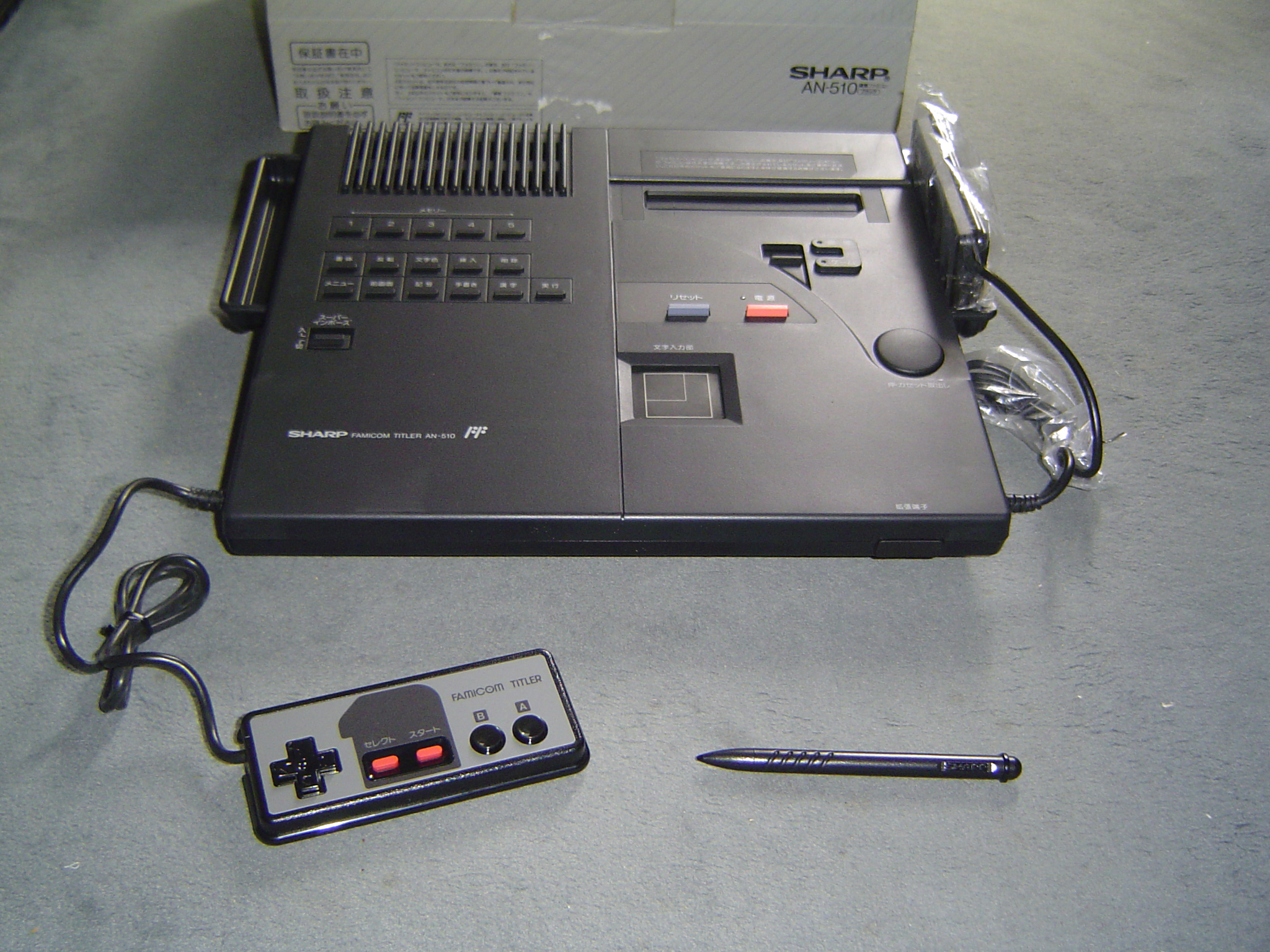 Sharp Famicom Titler AN-510